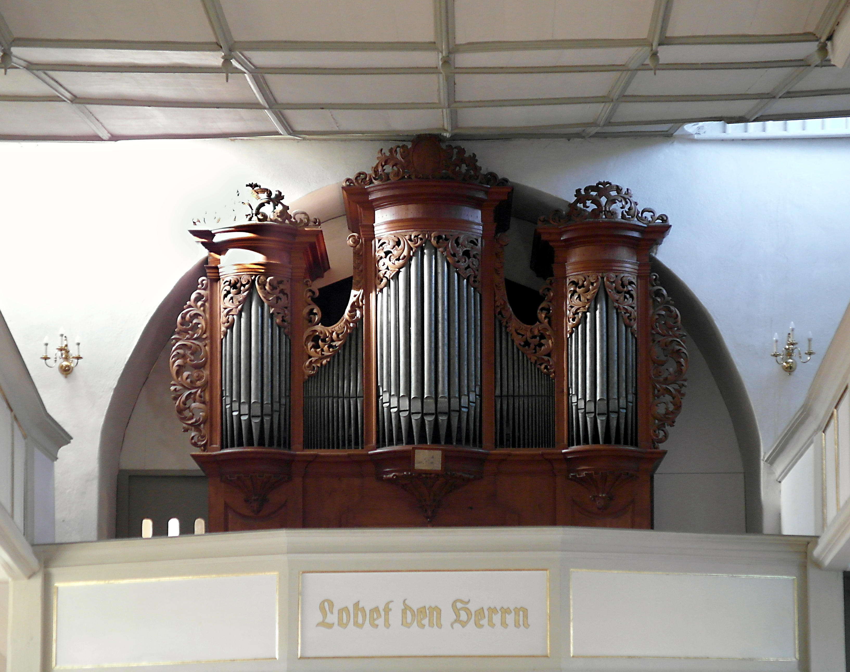 30.10.2018 01833 Dittersbach (Dürrröhrsdorf-Dittersbach), Hauptstraße 111: Evangelische Kirche (GMP: 51.036563,13.988027), errichtet nach dem Brand von 1660, Wiedereinweihung 1662. Einmanualige Orgel von Gottfried Silbermann aus dem Jahre 1726. Von den heute noch 27 vorhandenen Silbermann-Orgeln gehört die Dittersbacher zu den besonders gut erhaltenen und fast unveränderten. [SAM8488.JPG]20181030380DR.JPG(c)Blobelt